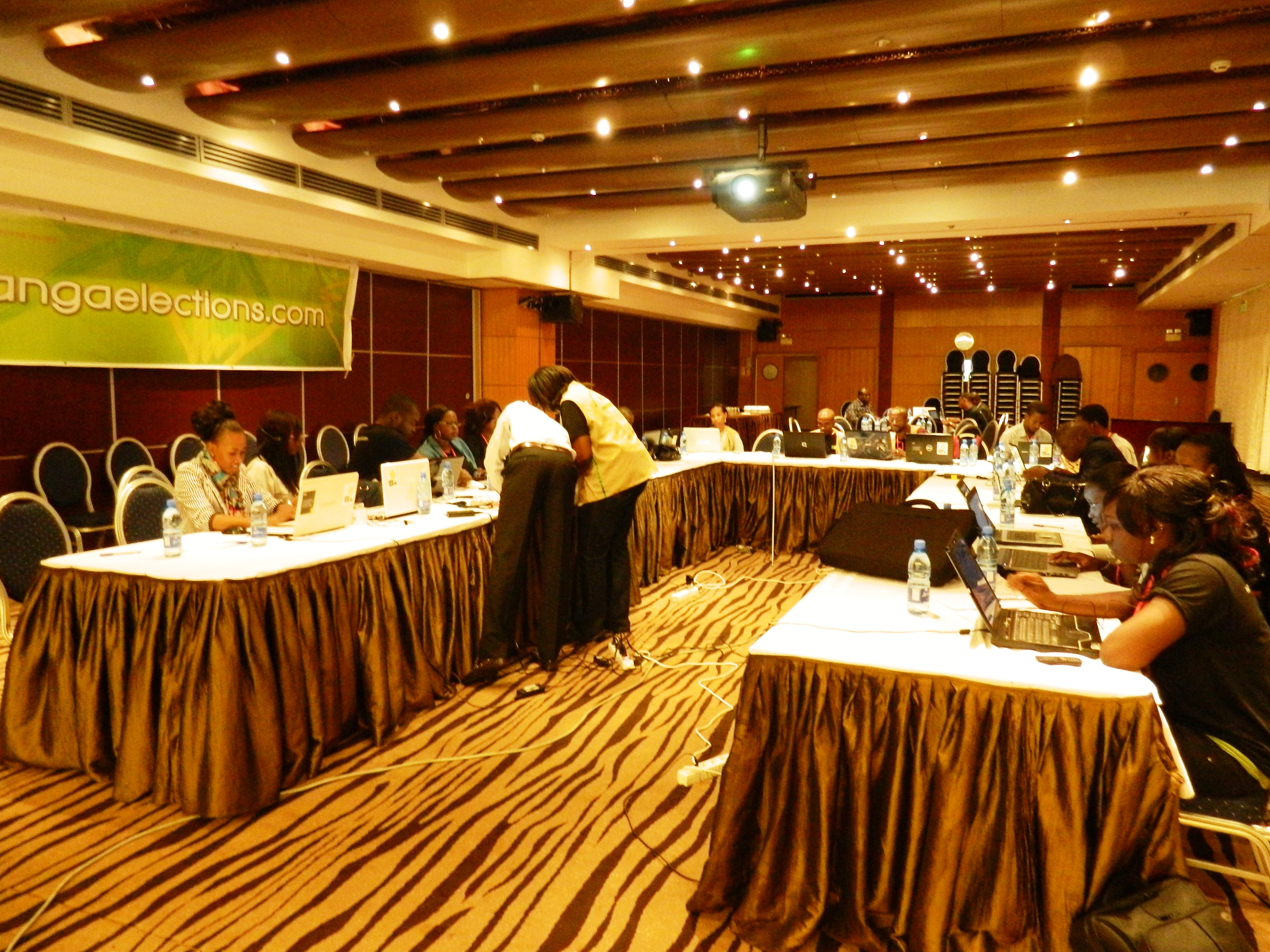 Chambre Techinque du Pôle dObeservation Citoyenne Electorale